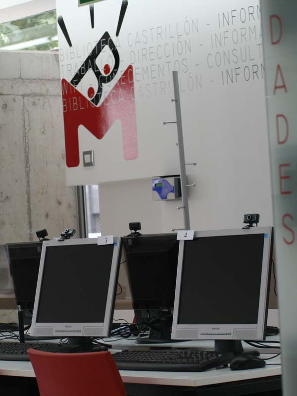 Ordenadores de consulta pública en la Biblioteca Municipal Castrillón de La Coruña